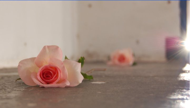 Rosas en memoria de los desaparecidos. Acto de recuperación del terreno donde funcionó el Centro Clandestino de Detención (CCD) de La Perla, Córdoba, Argentina.